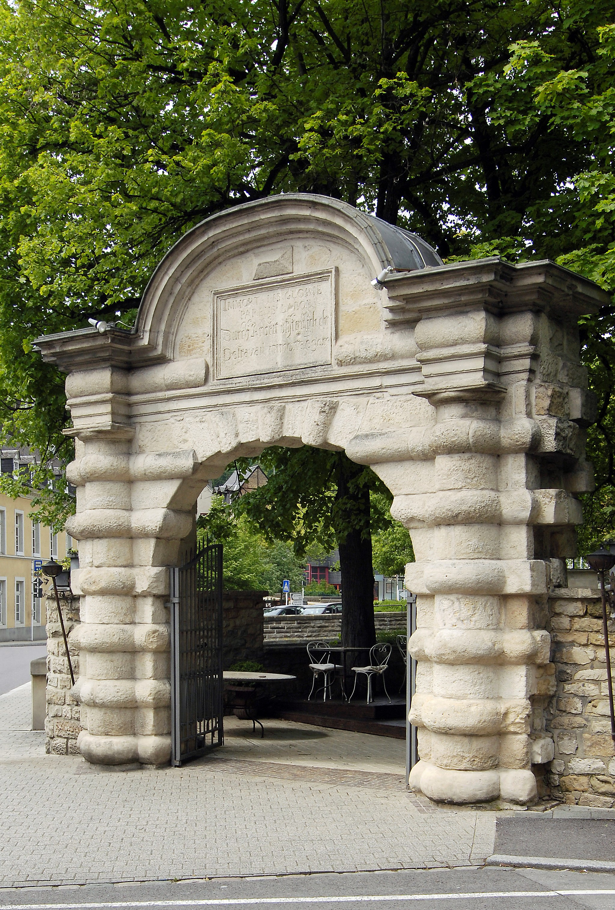 portail des jardins du palais Mansfeld